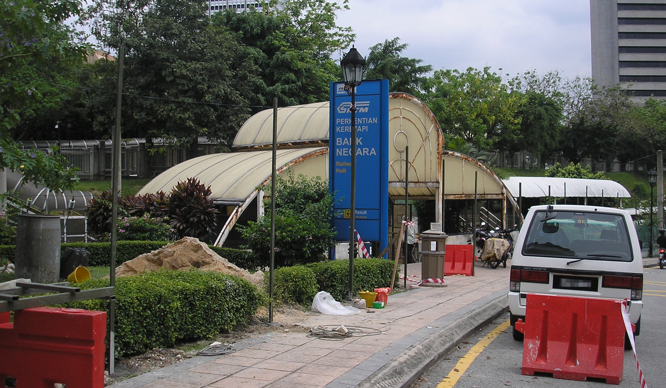 The Bank Negara station (Rawang-Seremban/Sentul-Port Klang) (entrance to the Rawang/Sentul-bound line), Kuala Lumpur, Malaysia.